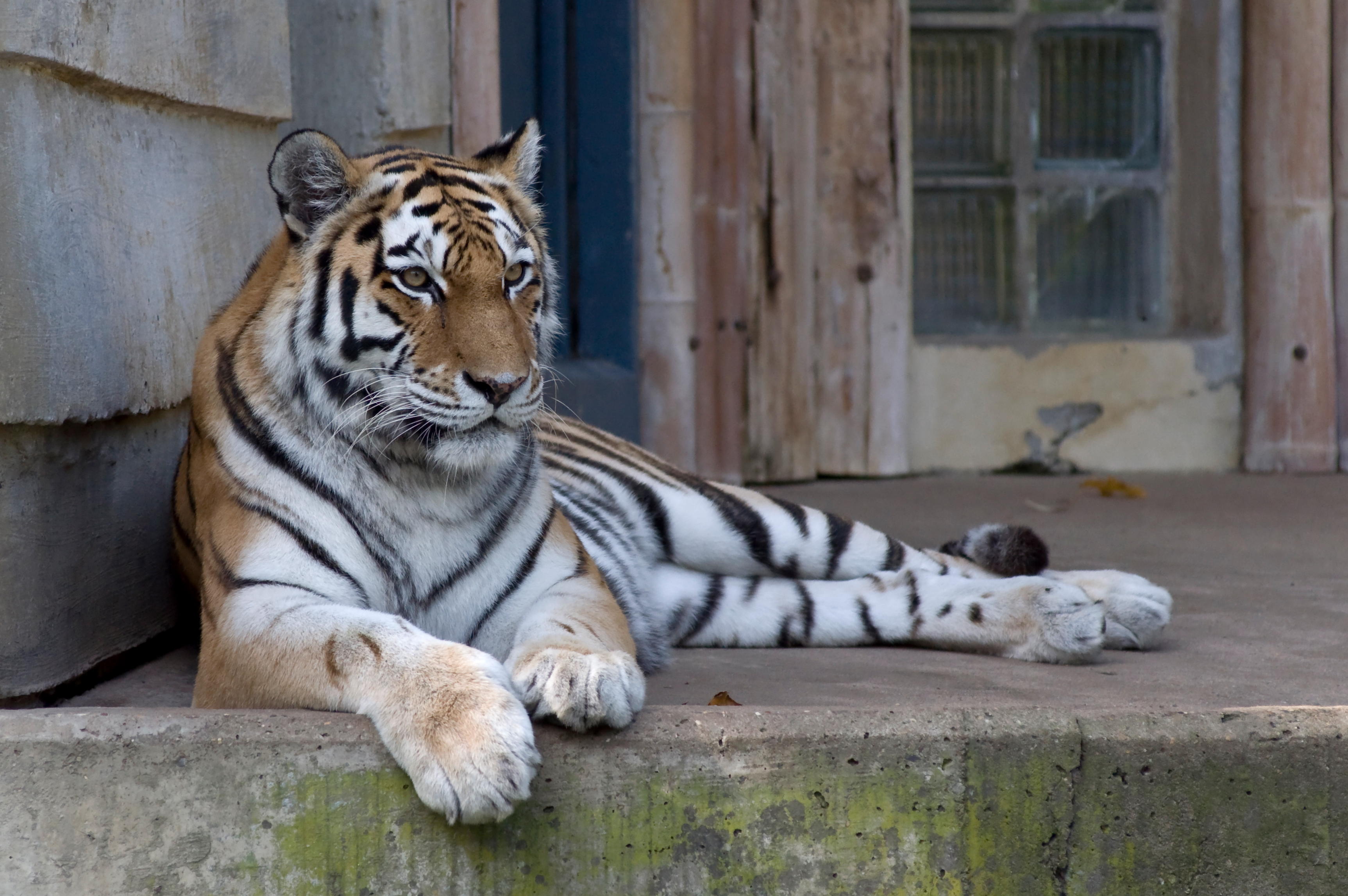 Siberische tijger (Panthera tigris altaica) in de zoo van Antwerpen, België